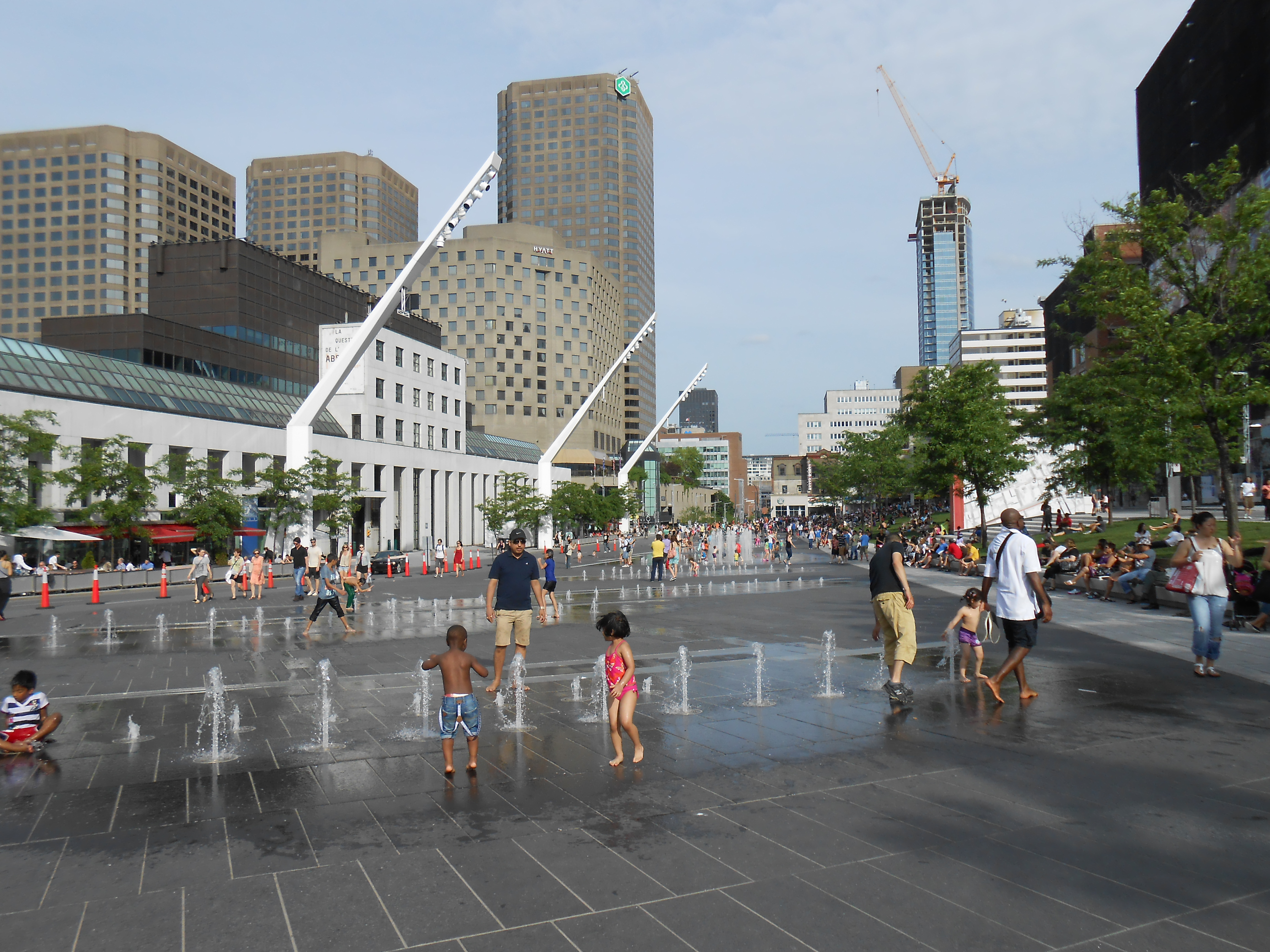 Place des Festivals, Quartier des spectacles, Montréal